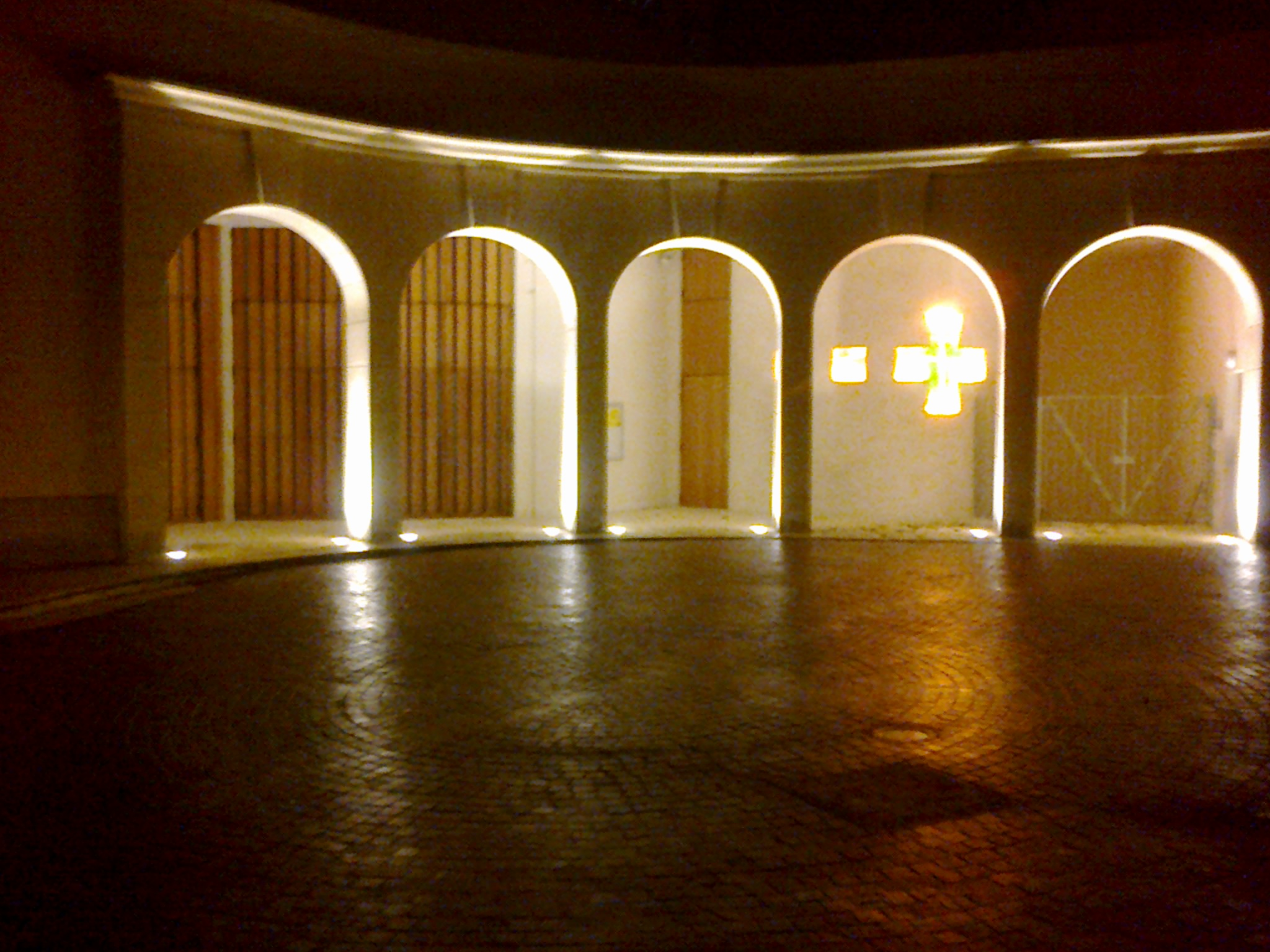 L'Eglise Saint-Denys de Vaucresson